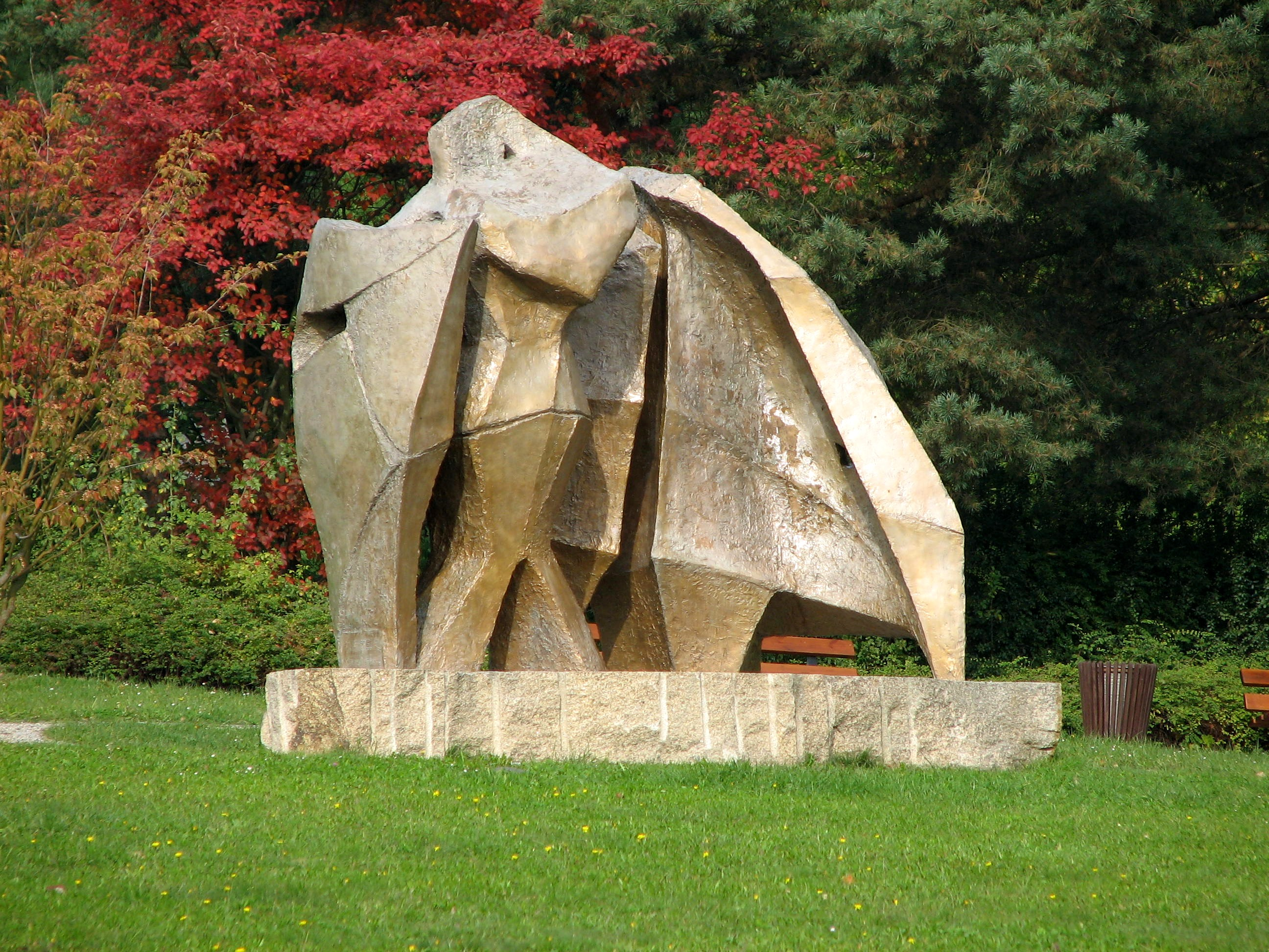 Skulptur Der Traum von Setsuzo Matusaka. Standort auf dem Grünen Hügel in Bayreut